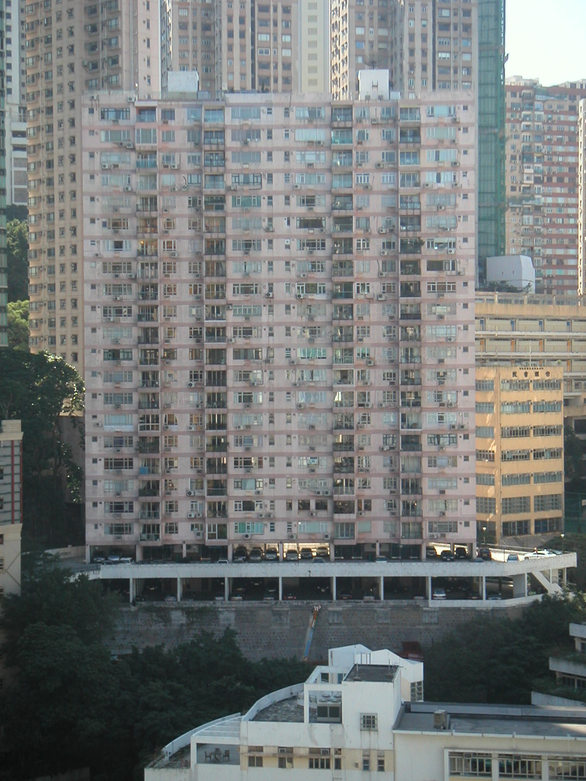 龍園 粵語: 龍園